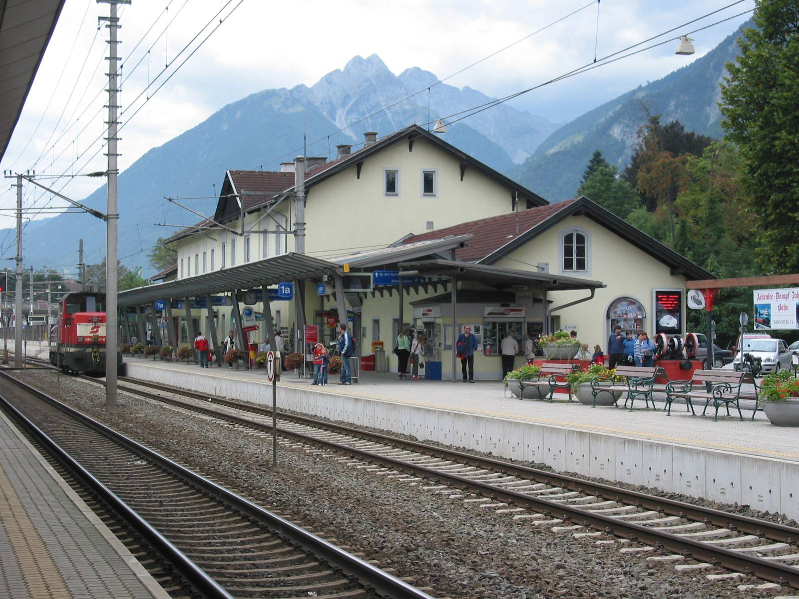 de: Bahnhof von Jenbach en: Train station of Jenbach